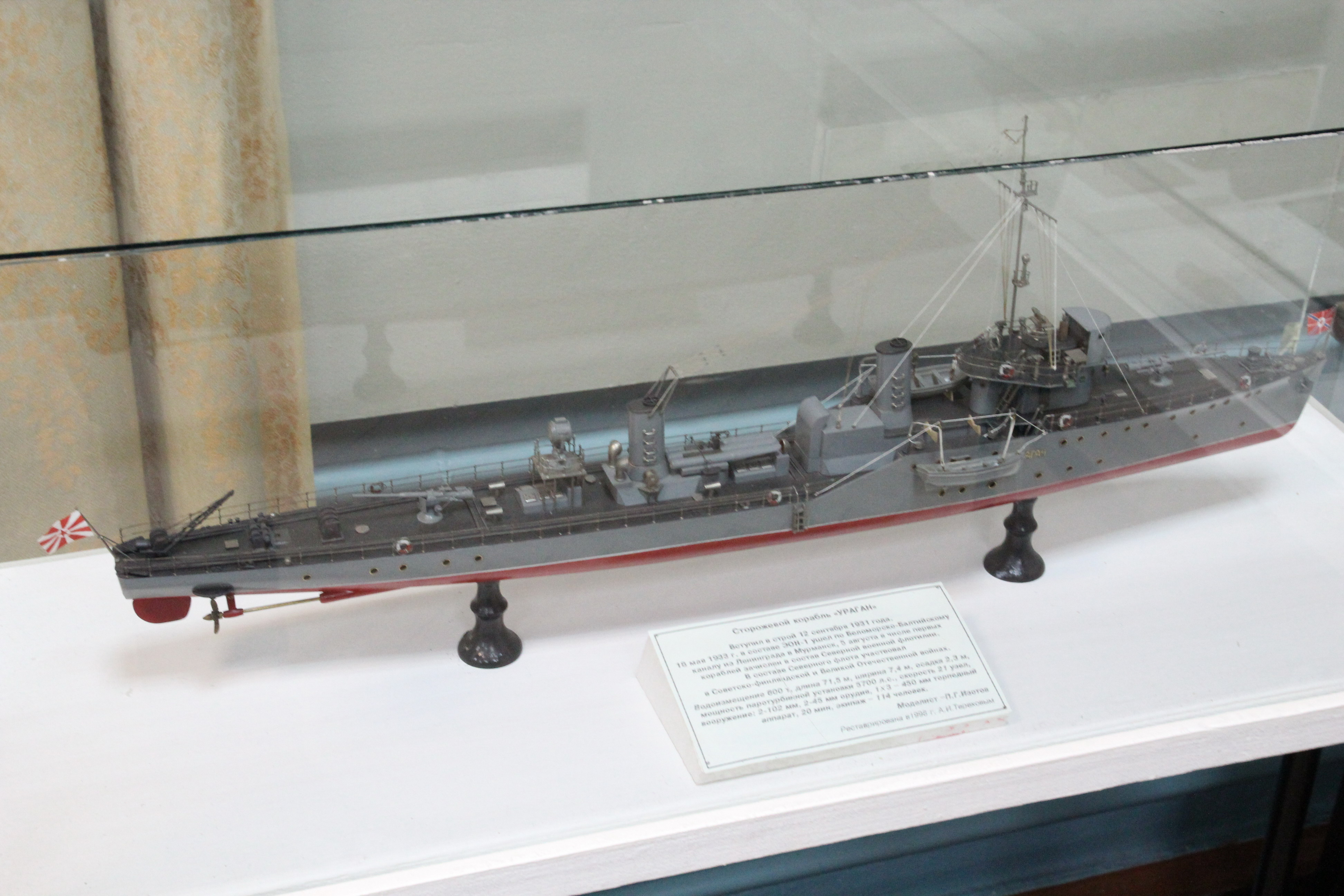 Модель сторожевого корабля Ураган